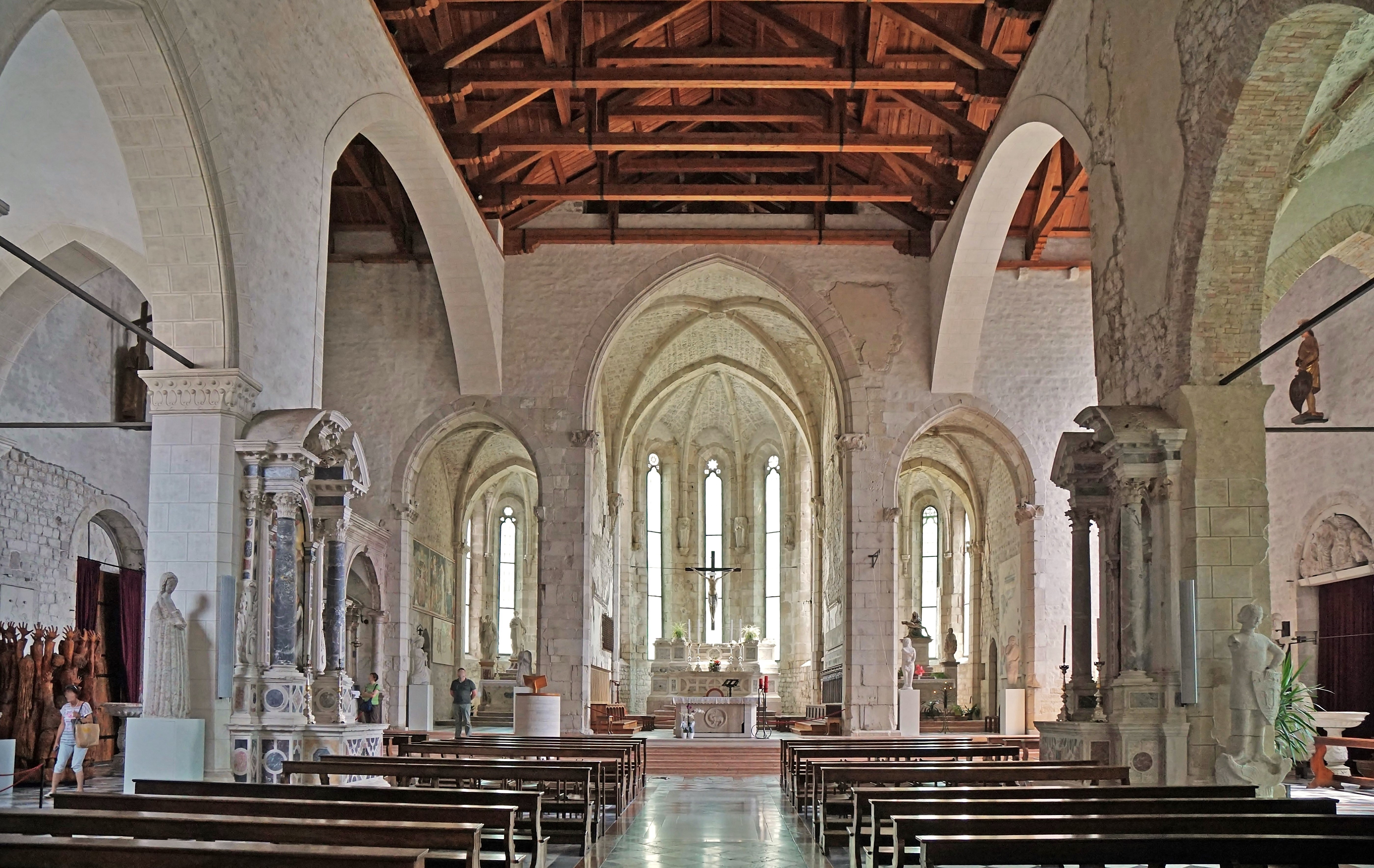 Innenansicht des Domes Heiliger Apostel Andreas (Venzone)